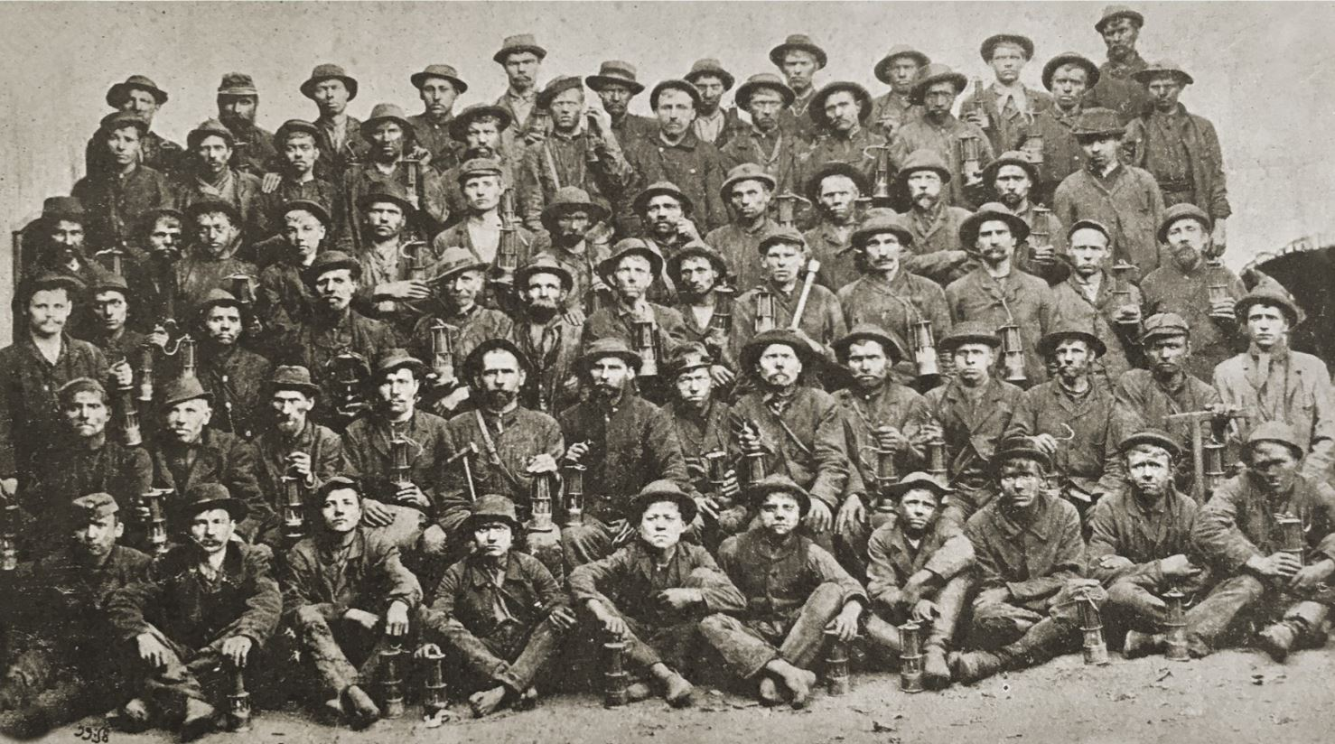 Skupina havířů